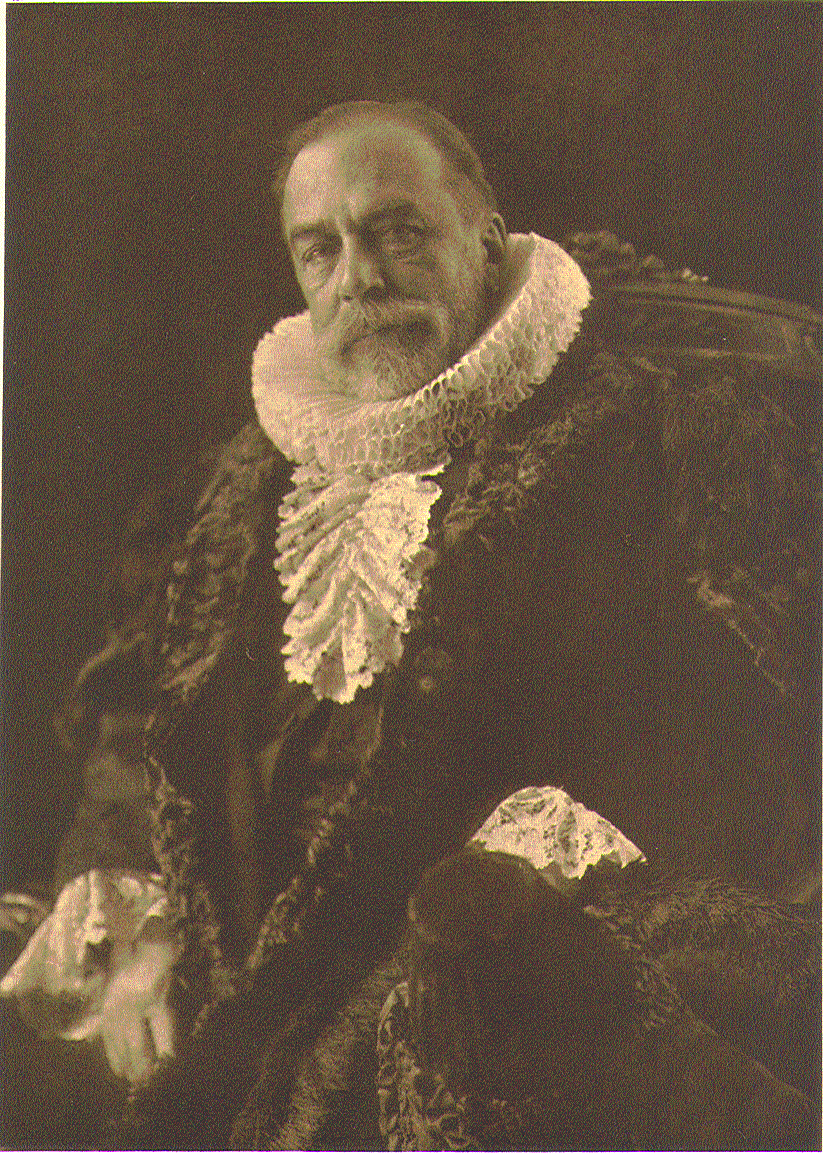 Gerhard Hachmann (1938–1904), Hamburger Bürgermeister